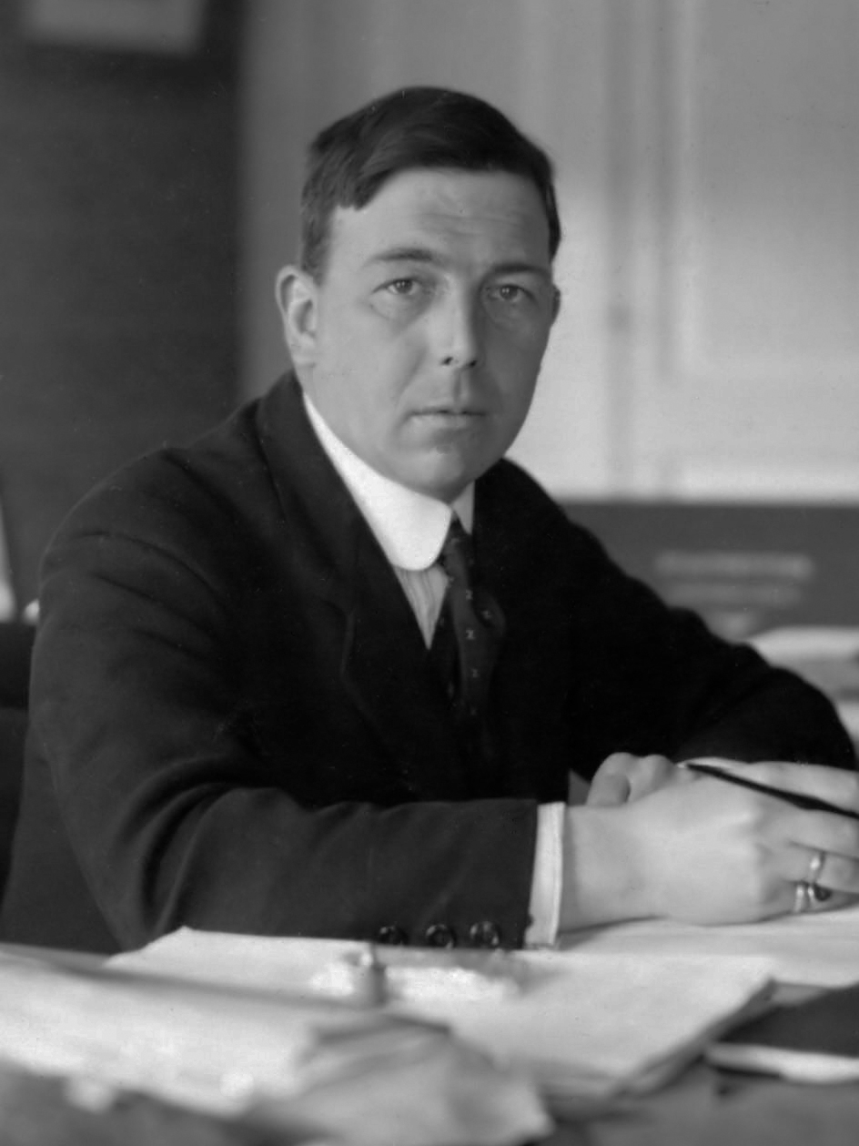 Jhr. mr. G.C.J. van Reenen (geb. 1884), burgemeester van Nijkerk juli 1923